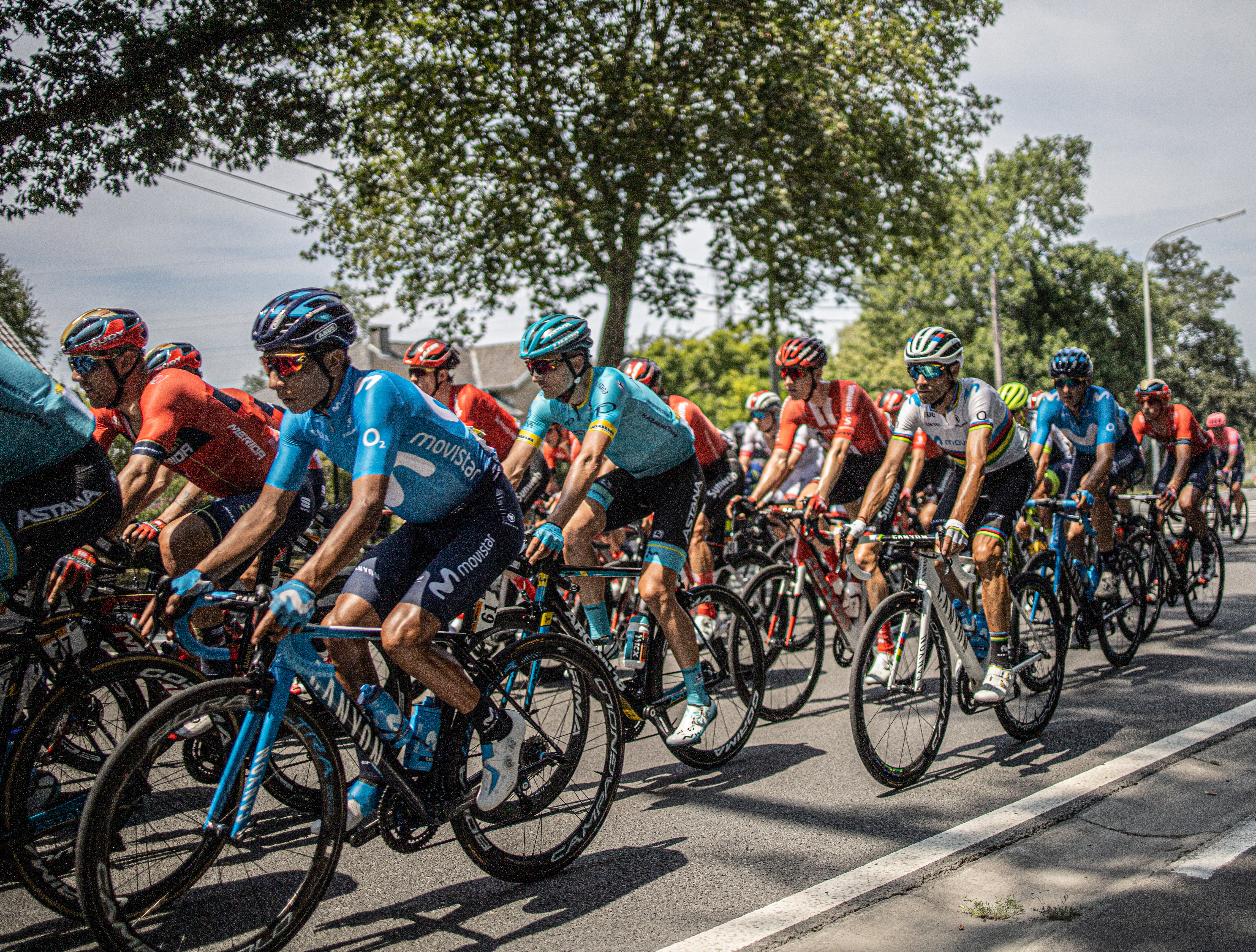 Le Tour de France 2019 passera trois jours en Belgique avant de rejoindre l’Hexagone. A l’occasion de la première étape, le peloton traversera Enghien ! Peloton während der ersten Etappein Enghien